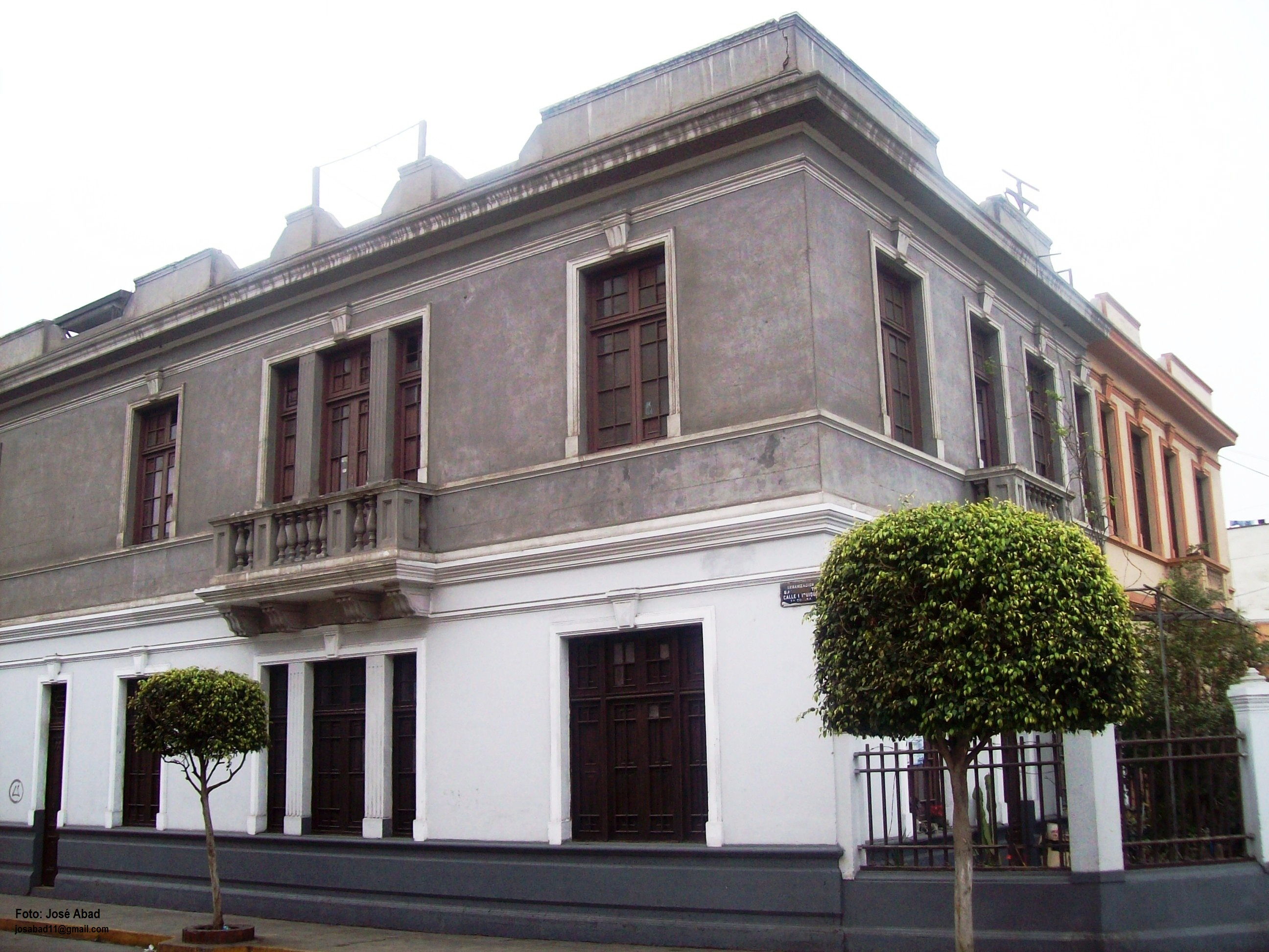 Esquina del Jr. Iquique con la Avenida República de Portugal en el Distrito de Breña. La placa de la calle dice: "Urbanización Garden City, Iquique 7ma cuadra".